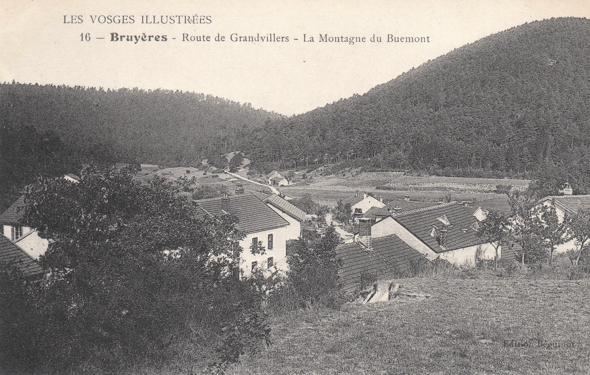 Carte postale ancienne Edition Béguinot de Bruyères - Route de Grandvillers, la Montagne du Buemont